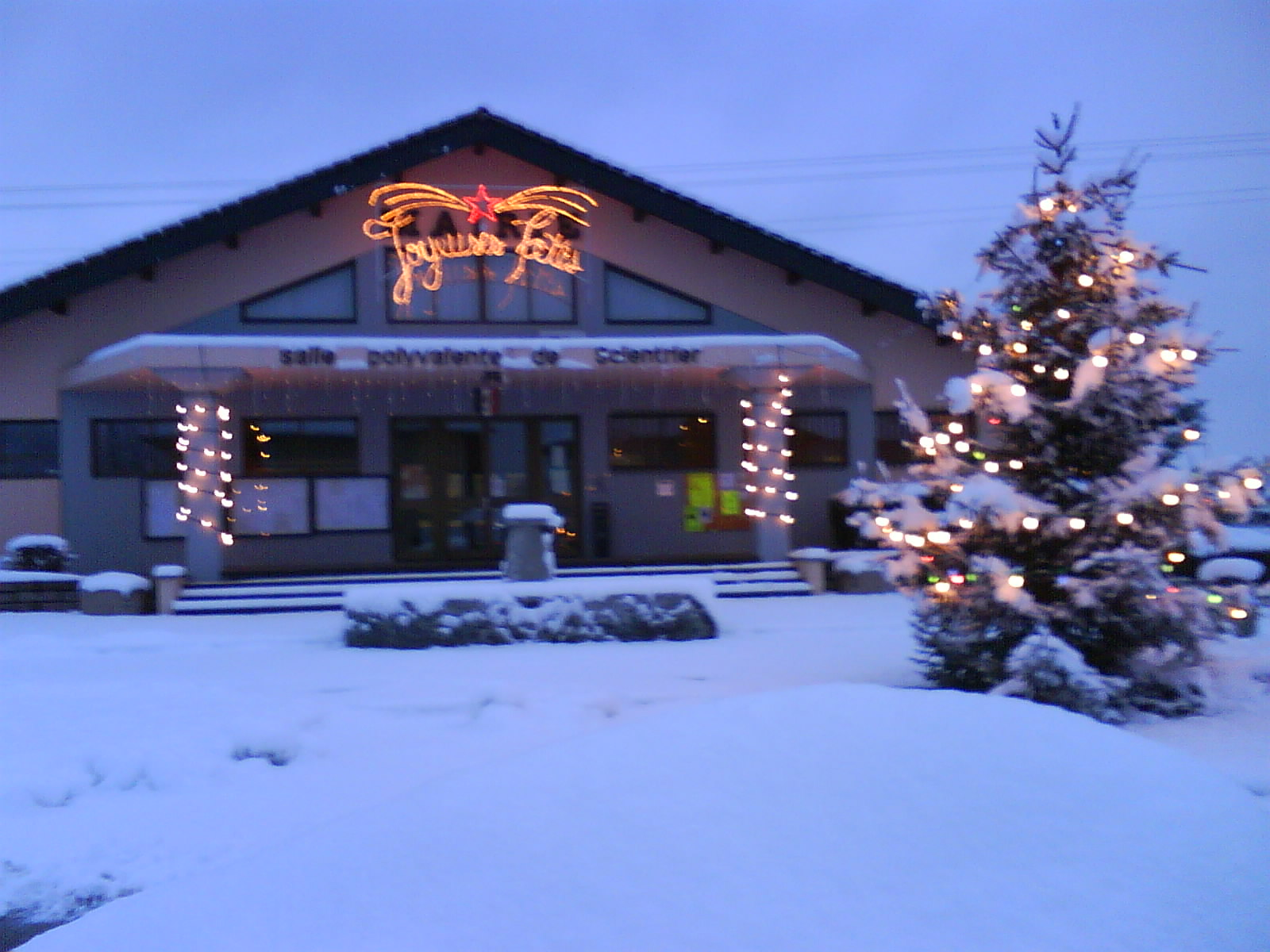 Mairie et salle polyvalente de Scientrier